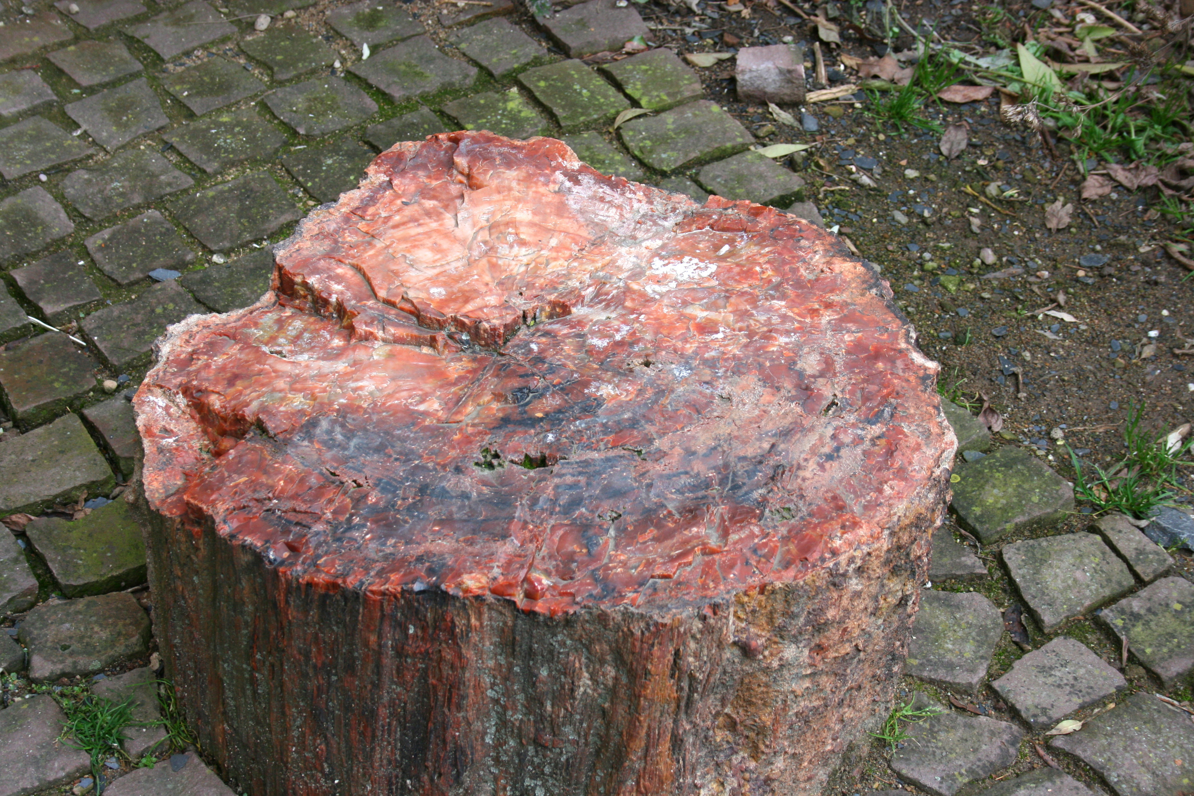 Mineralogisches Museum der Philipps-Universität in Marburg